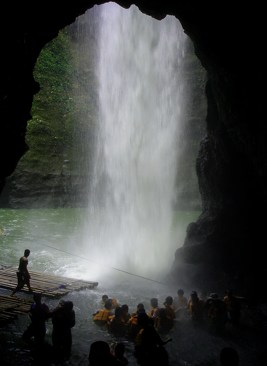 Pagsanjan Falls, Pagsanjan, Laguna, Philippines. View from inside.